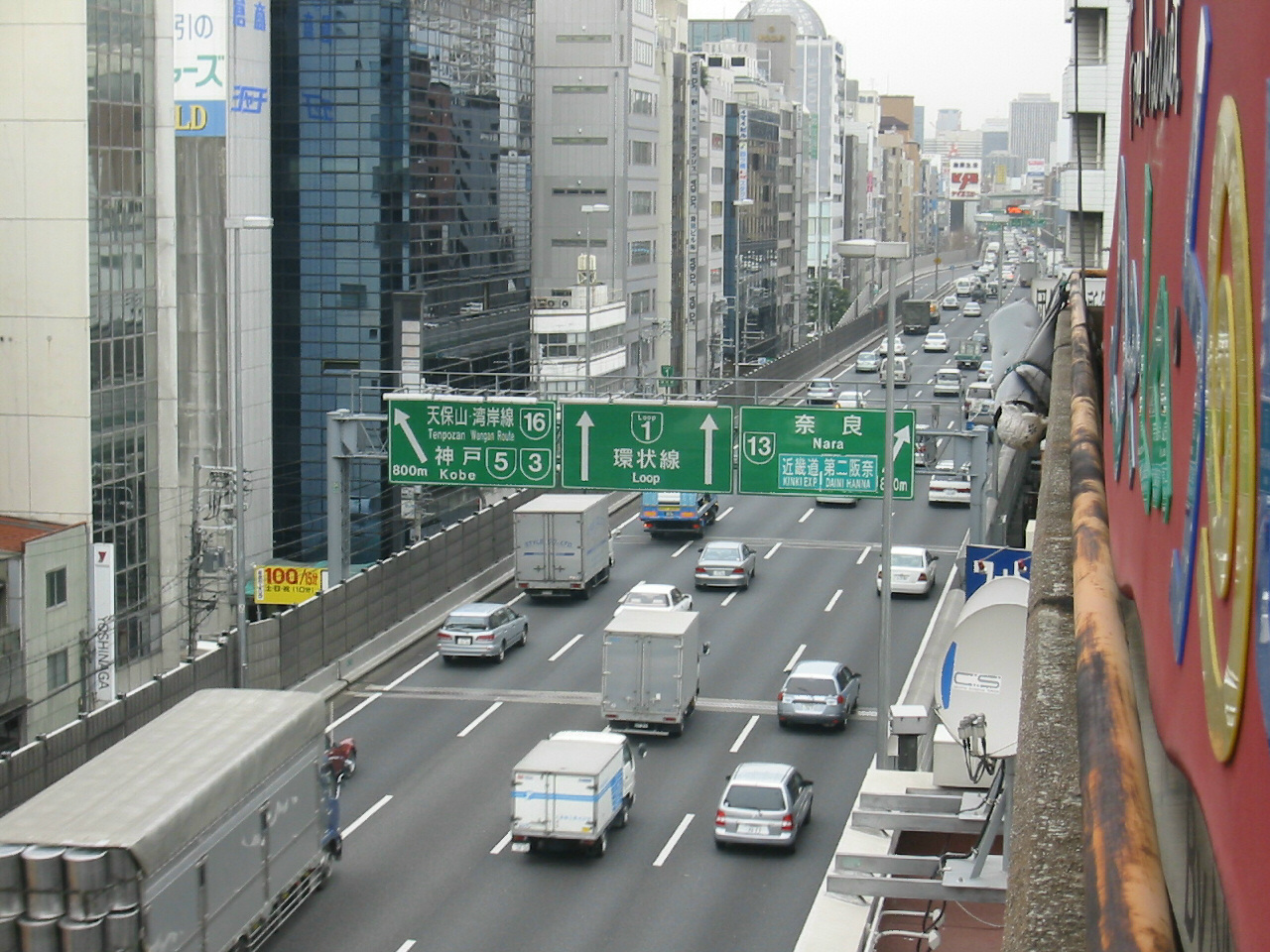 loop